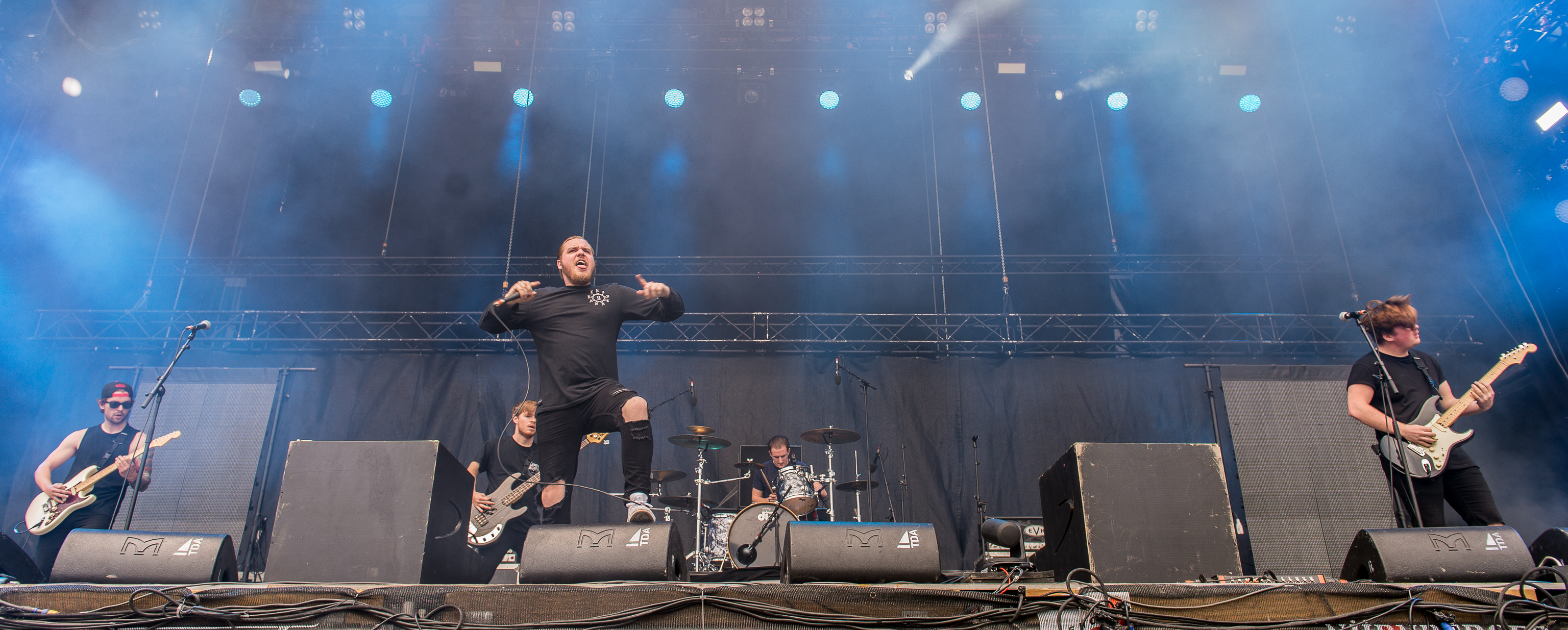 ARGO-Konzerte,Beck's Park Stage,Briton Bond,Chris Gaylord,Cody Quistad,Festival,Konzert,Livekonzert,Livemusik,Musik,RiP,Rock im Park 2016,Seth Blake,Stephen Kluesener,Wage War